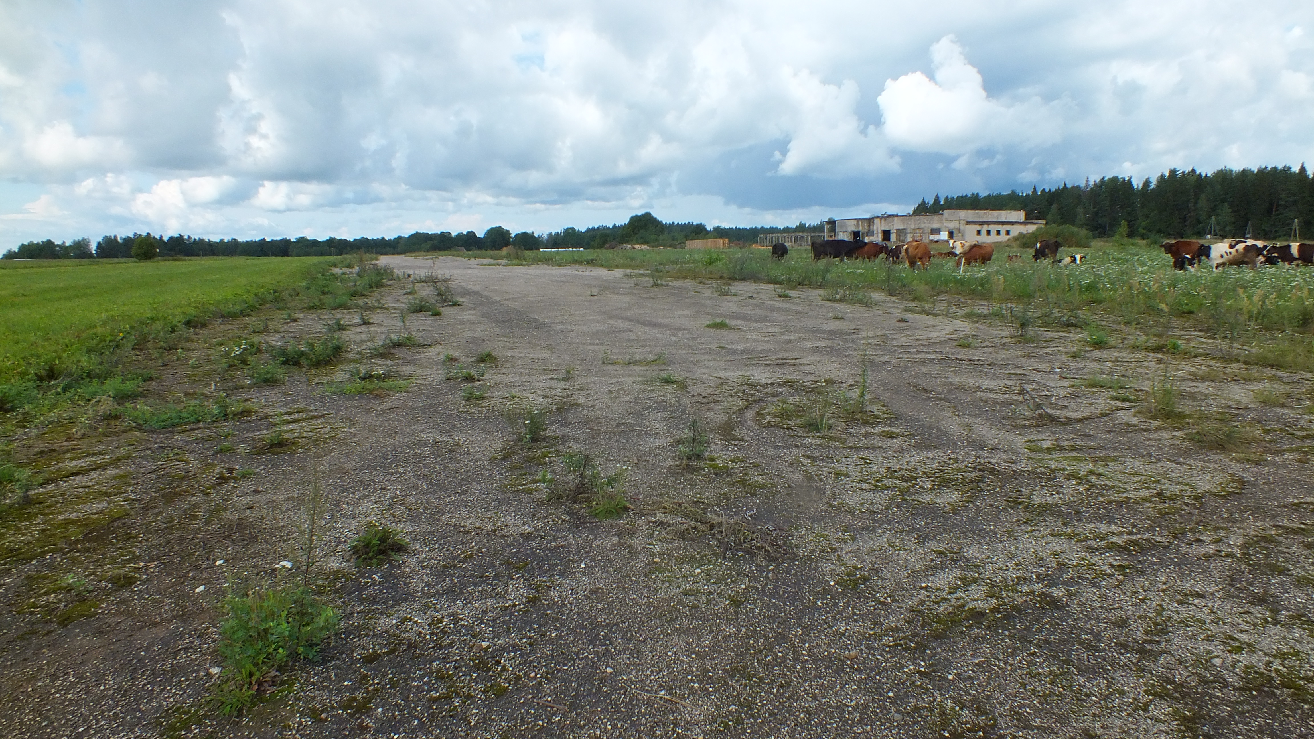 Birzgales lidlauks